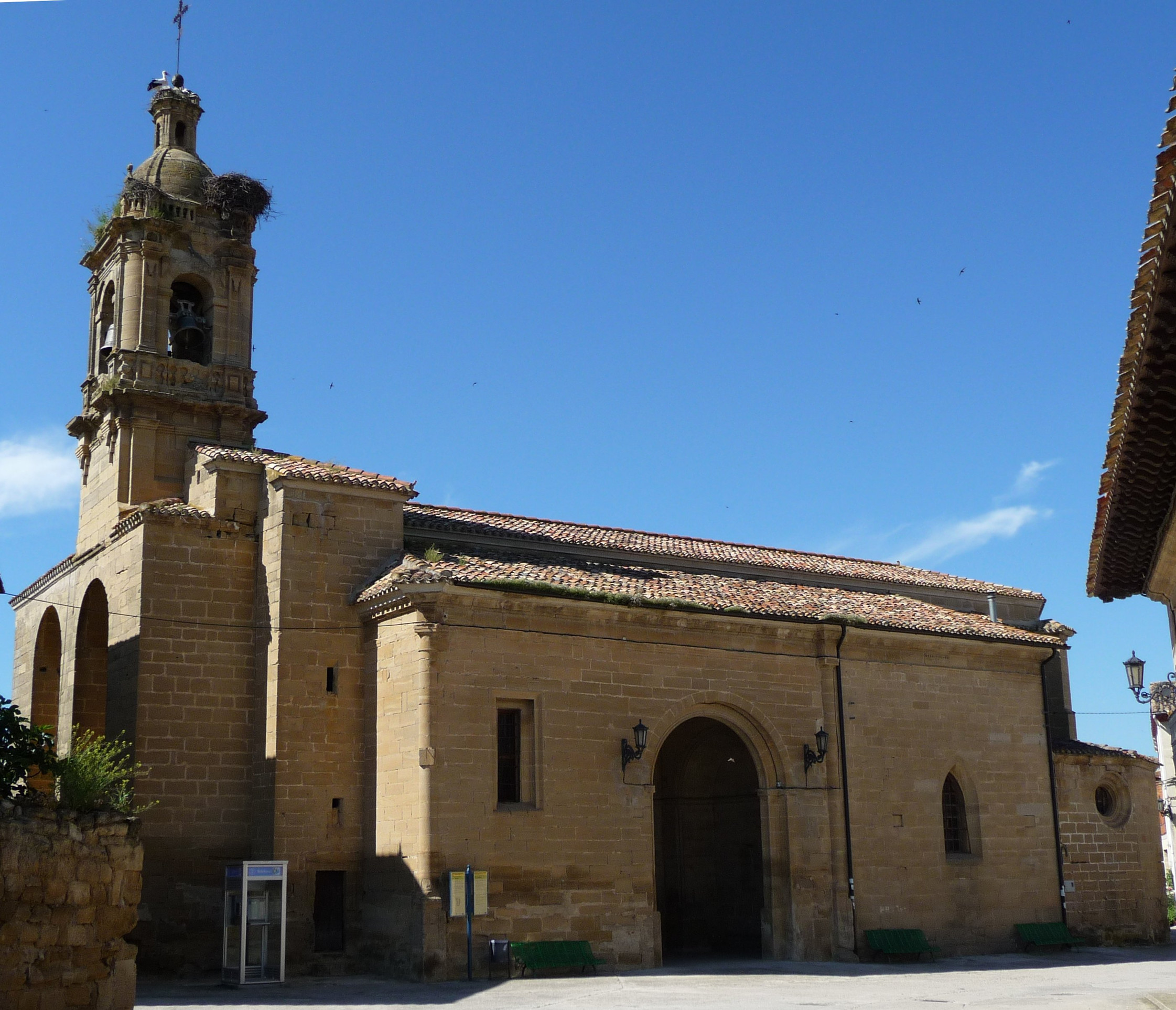 Iglesia Parroquial de San Esteban - Herramélluri. La Rioja (España)